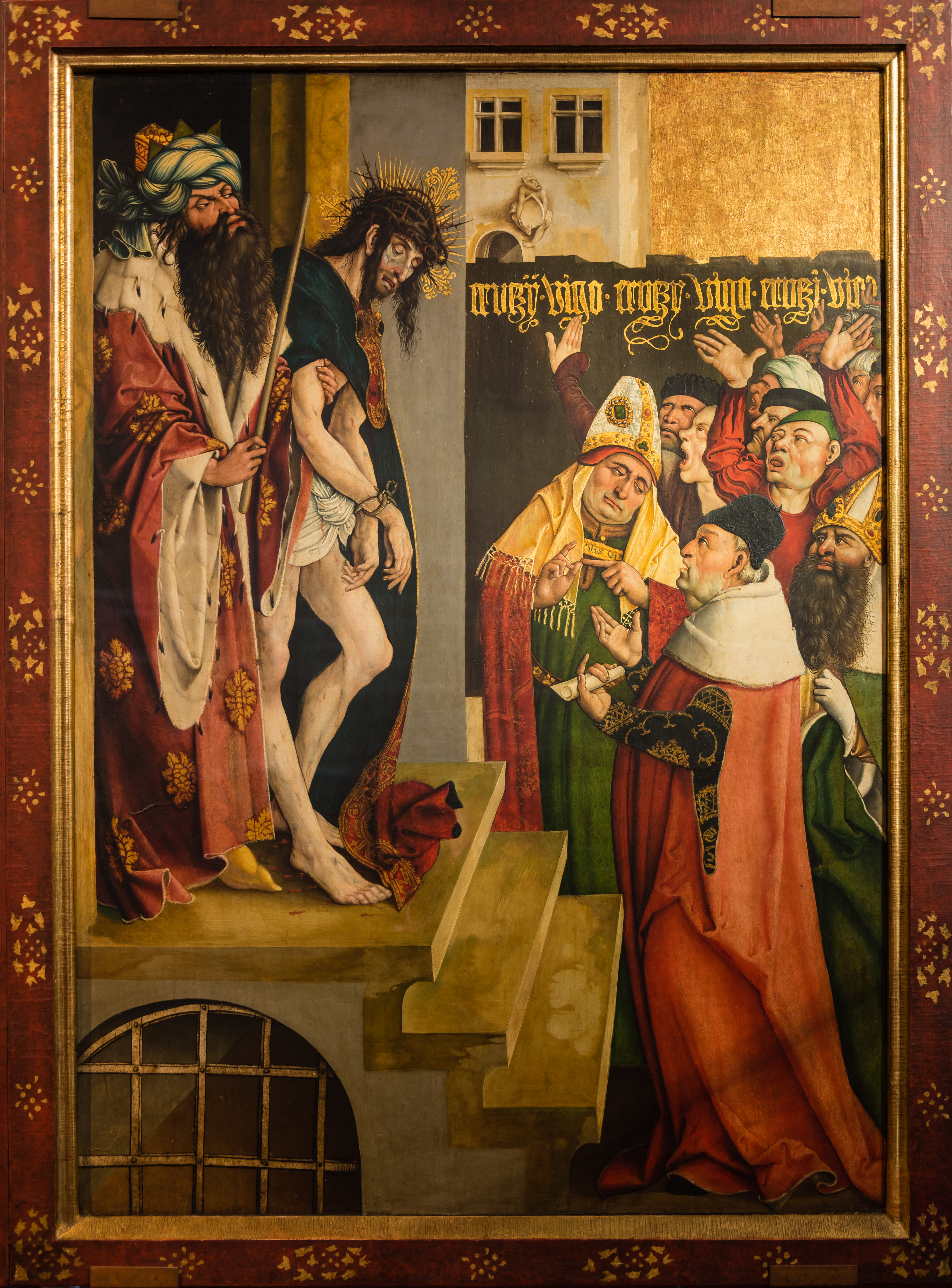 Melk Altar